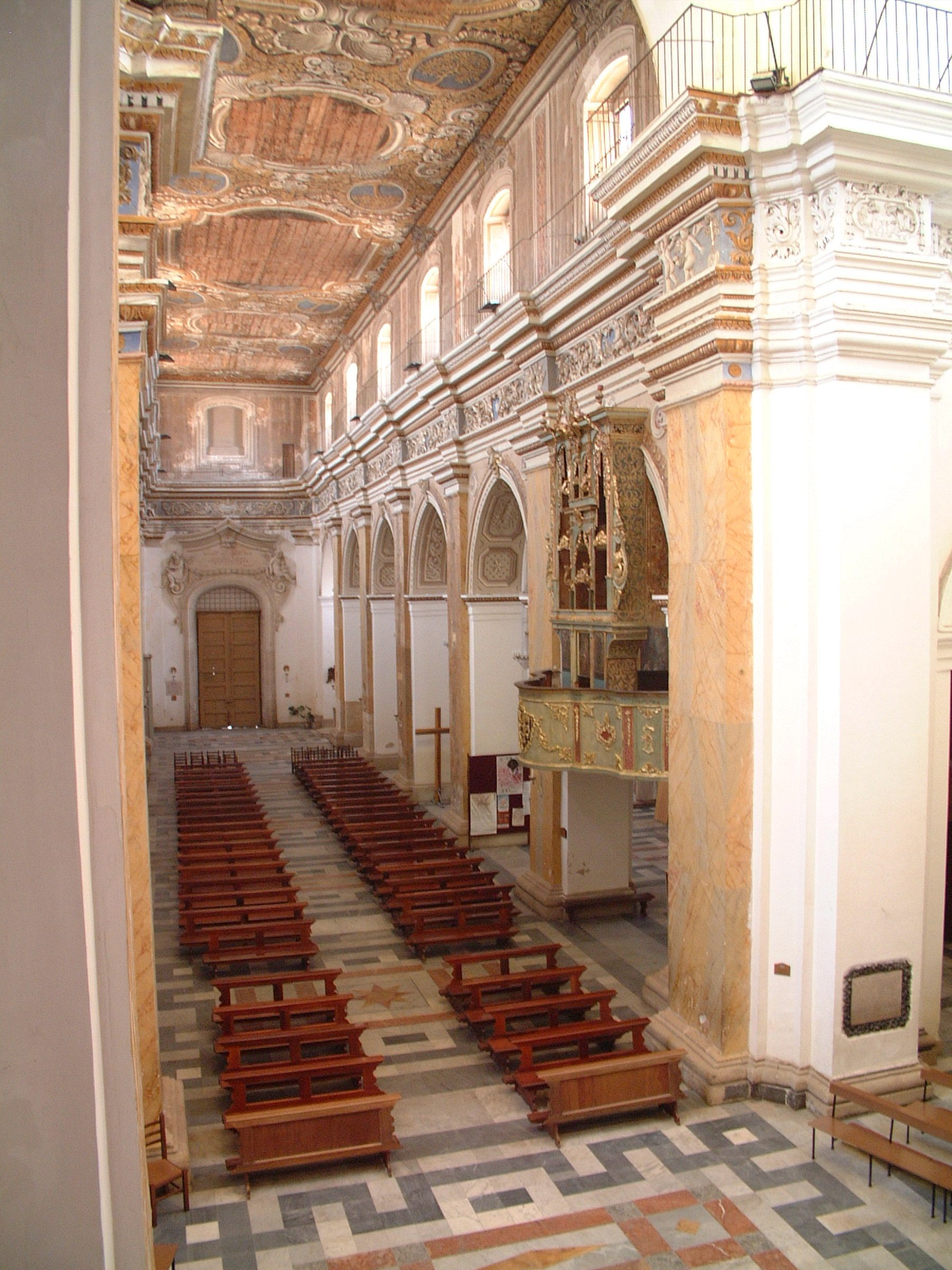 Chiesa Madre di Comiso - Santa Maria delle Stelle - Navata centrale